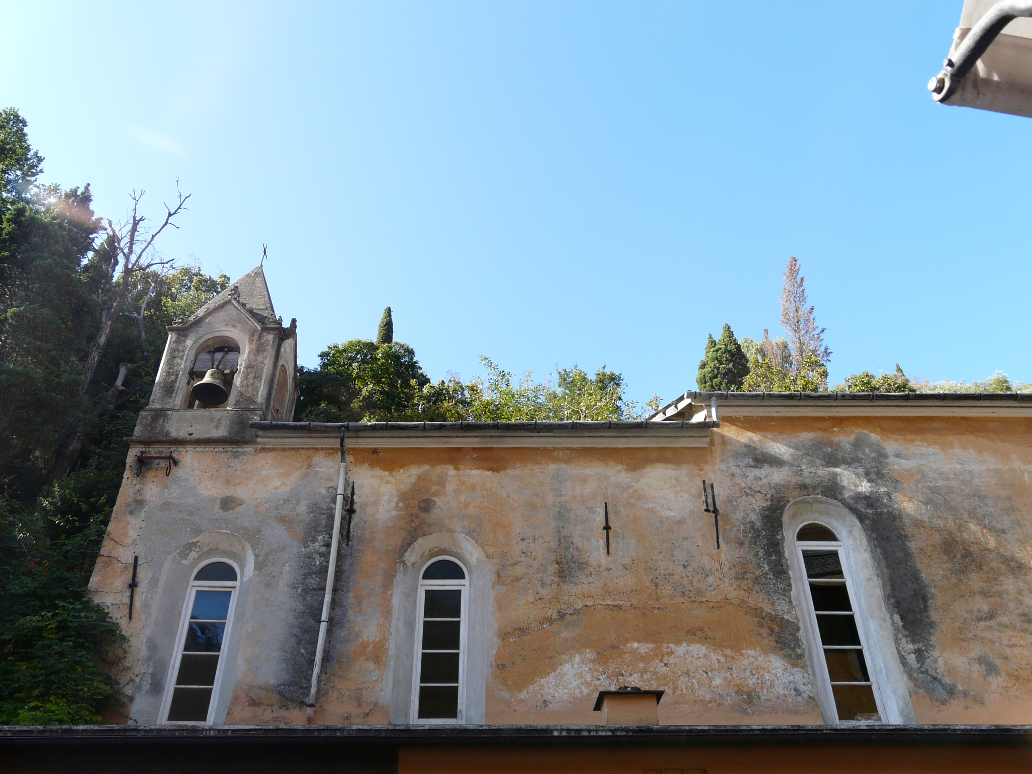 Oratorio della Confraternita di Nostra Signora Assunta, Portofino, Liguria, Italia